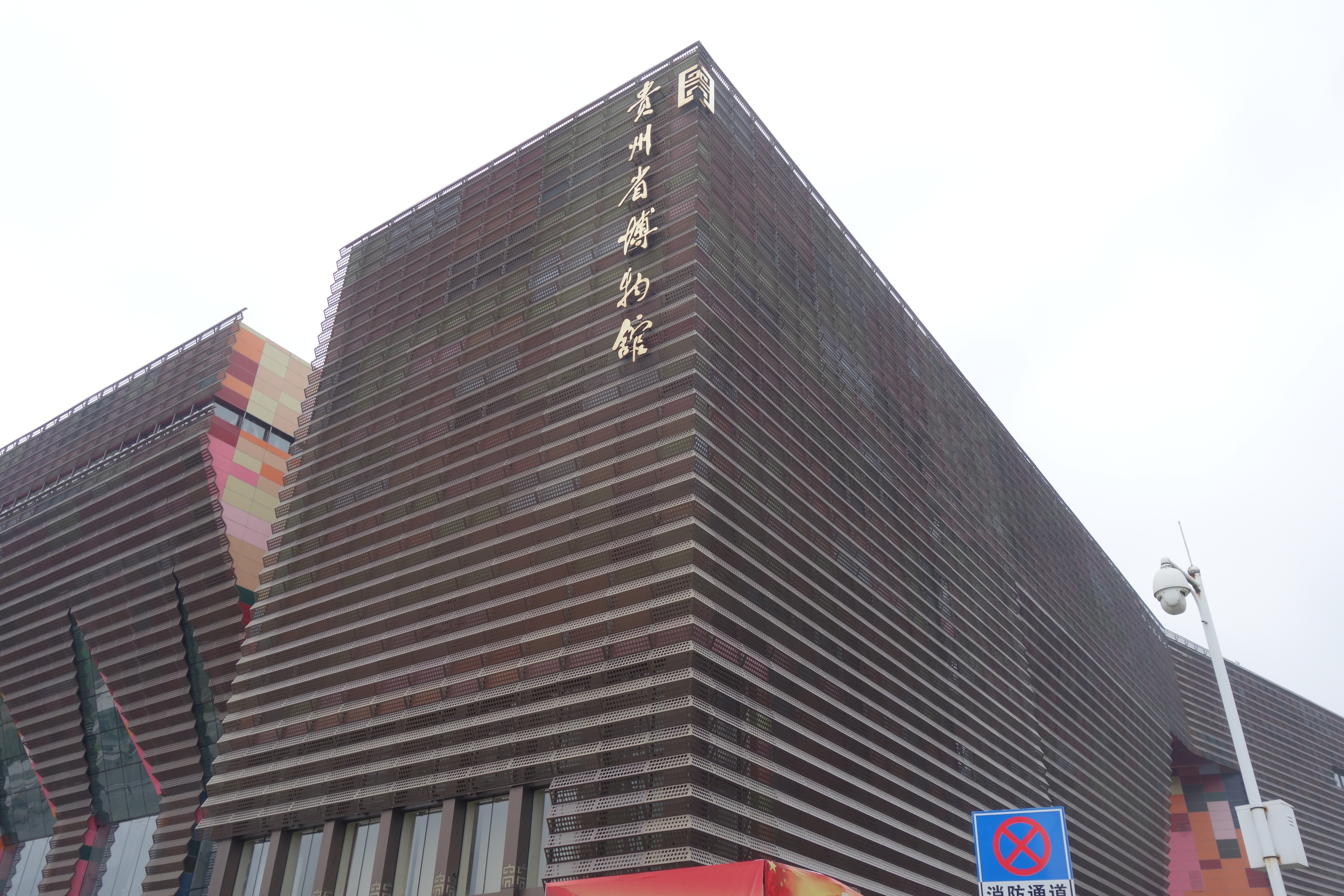 中文（中国大陆）: 贵州省博物馆外景，以仰视角度拍摄。